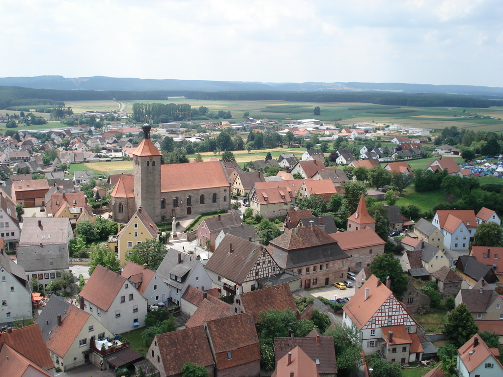 Abenberg